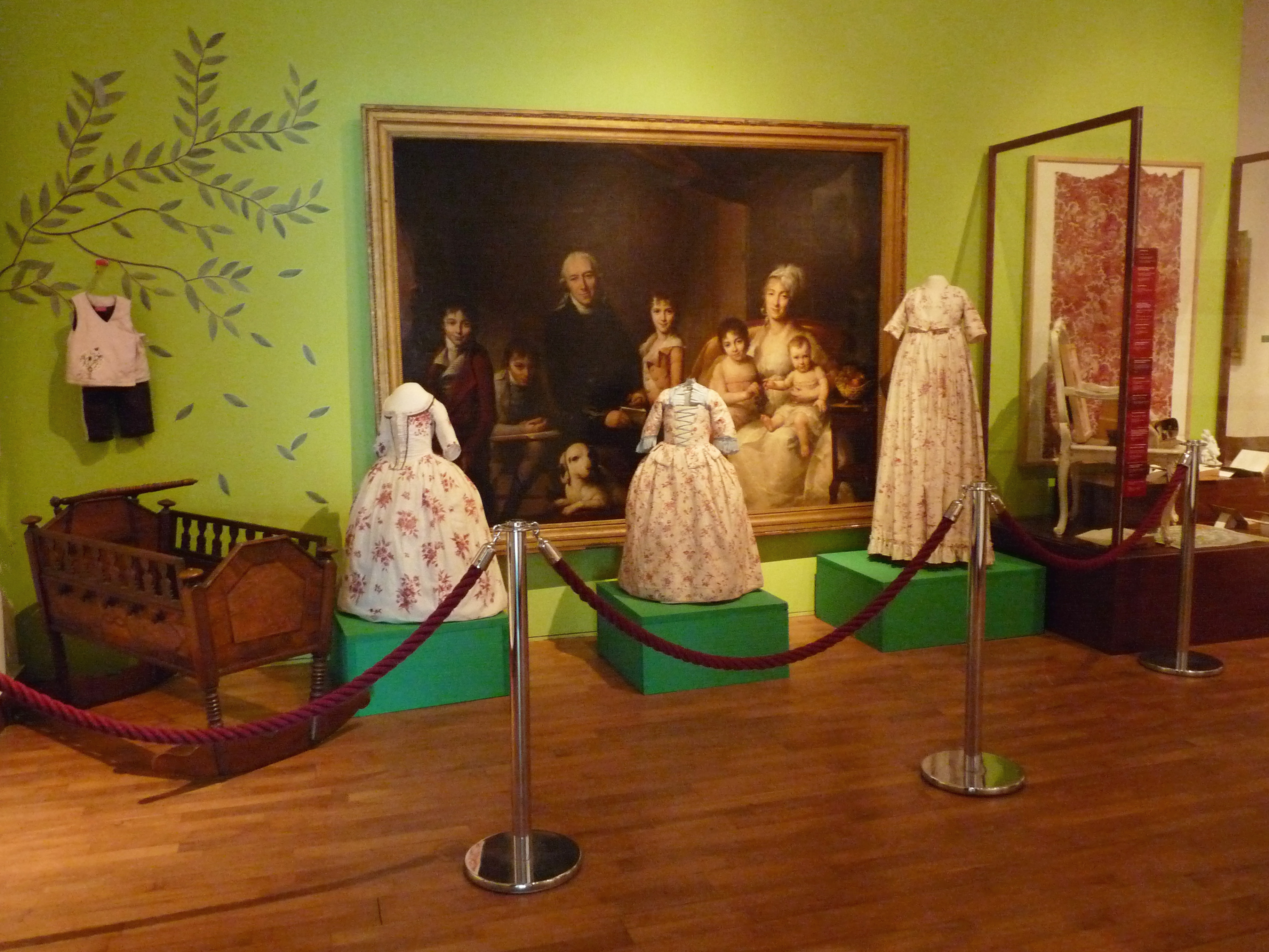 Mulhouse : exposition temporaire au Musée de l'impression sur étoffes : L'enfant et le tissu imprimé de 1750 à nos jours